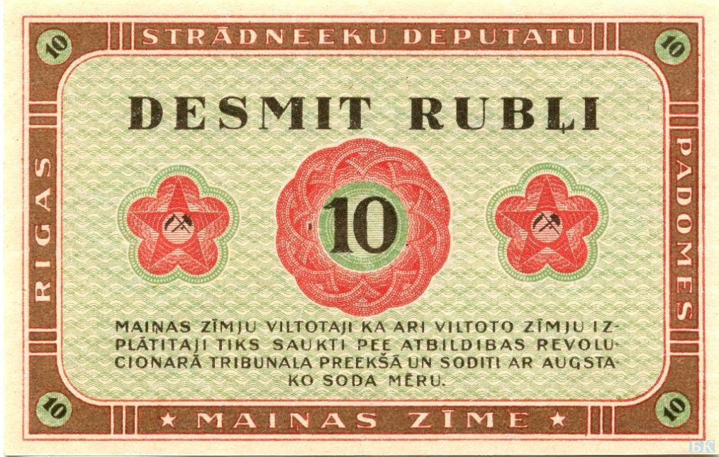 10 рублей ЛатССР 1919 реверс